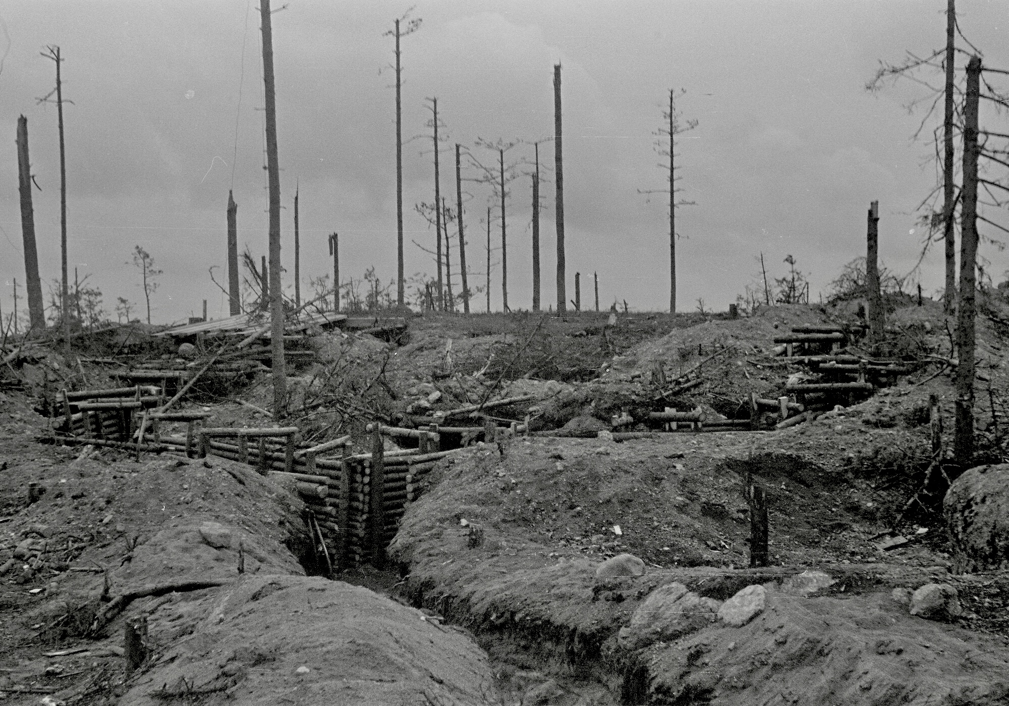 Kovien taistelujen näyttämö. (""Golgata"" takaapäin). Ihantala 1944.09.09.